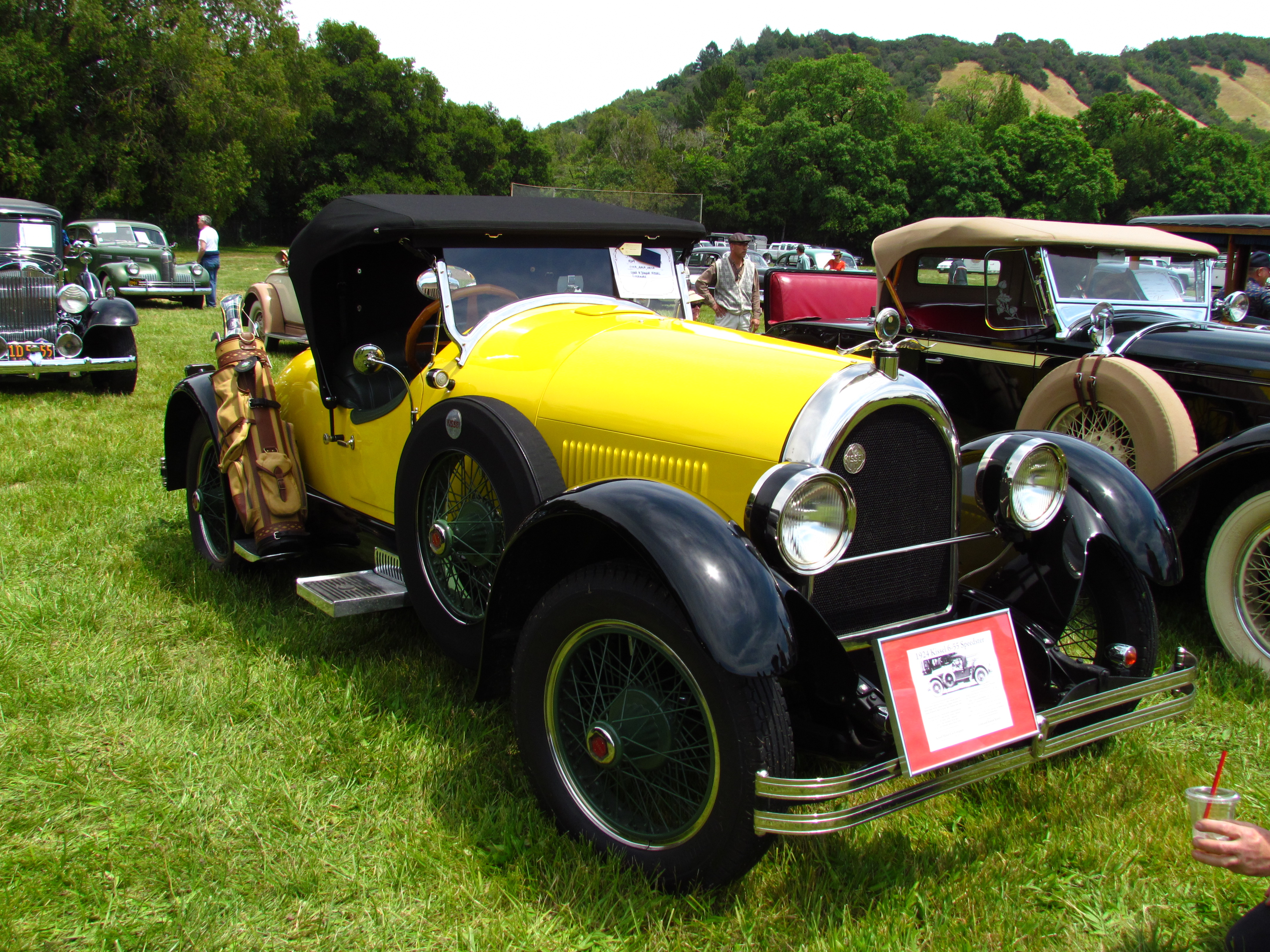 1924 Kissel Gold Bug